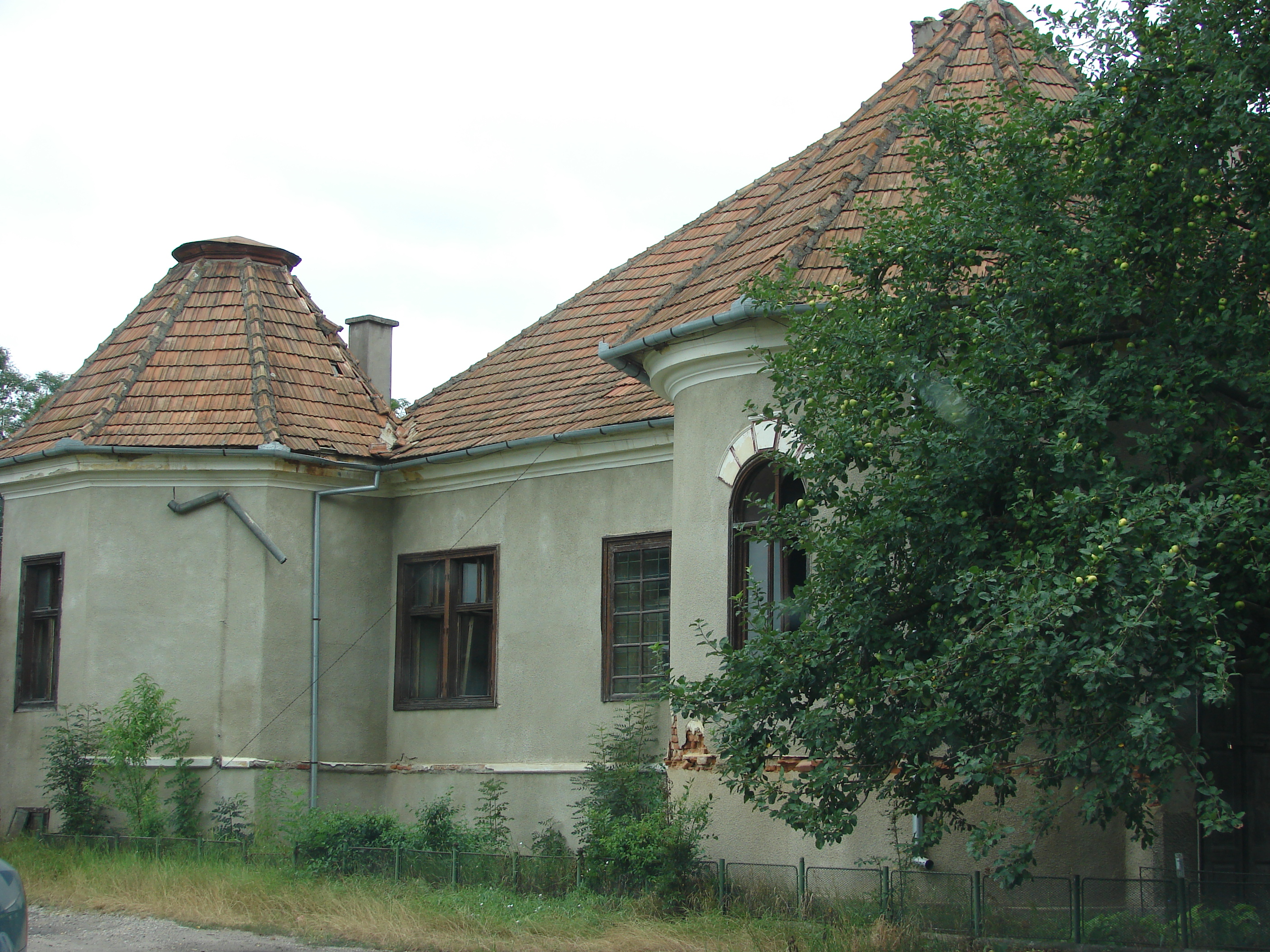 Poza 1